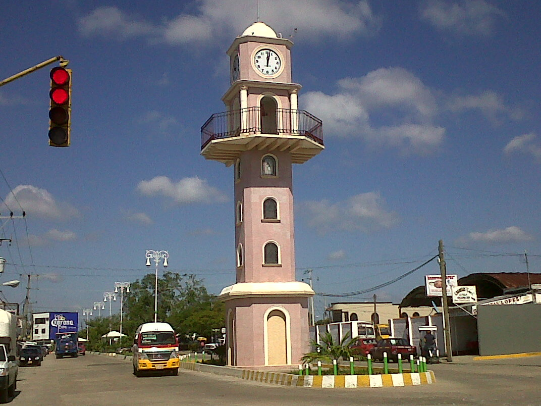 Reloj ubicado en la ciudad de Macuspana, estado de Tabasco, México